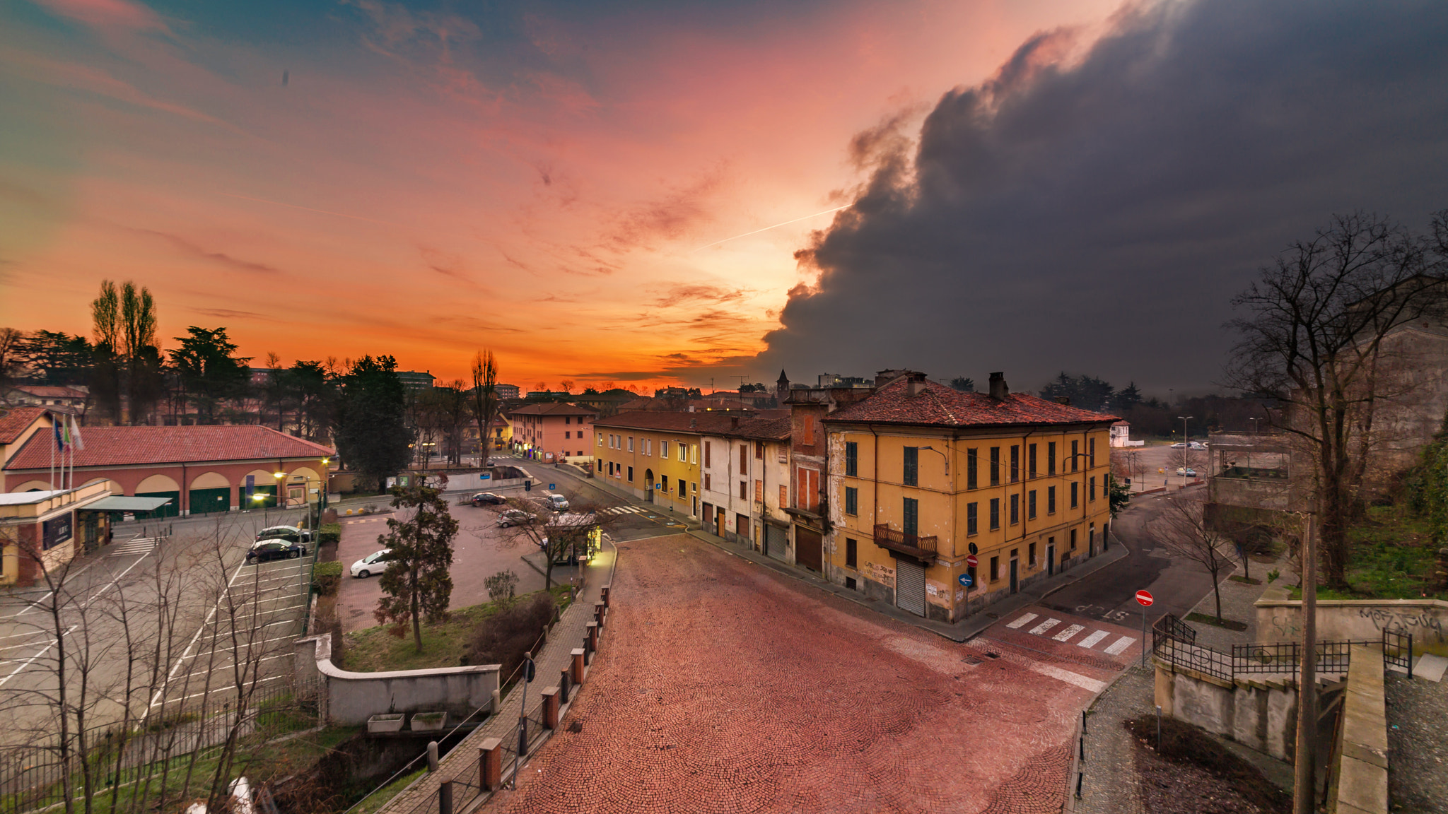 500px provided description: Winter dawn in Castellanza [#landscape ,#sunrise ,#morning ,#hdr ,#italy ,#cityscape ,#town ,#village ,#dawn ,#italia ,#lombardia ,#lombardy ,#paesaggio ,#alba ,#castellanza]